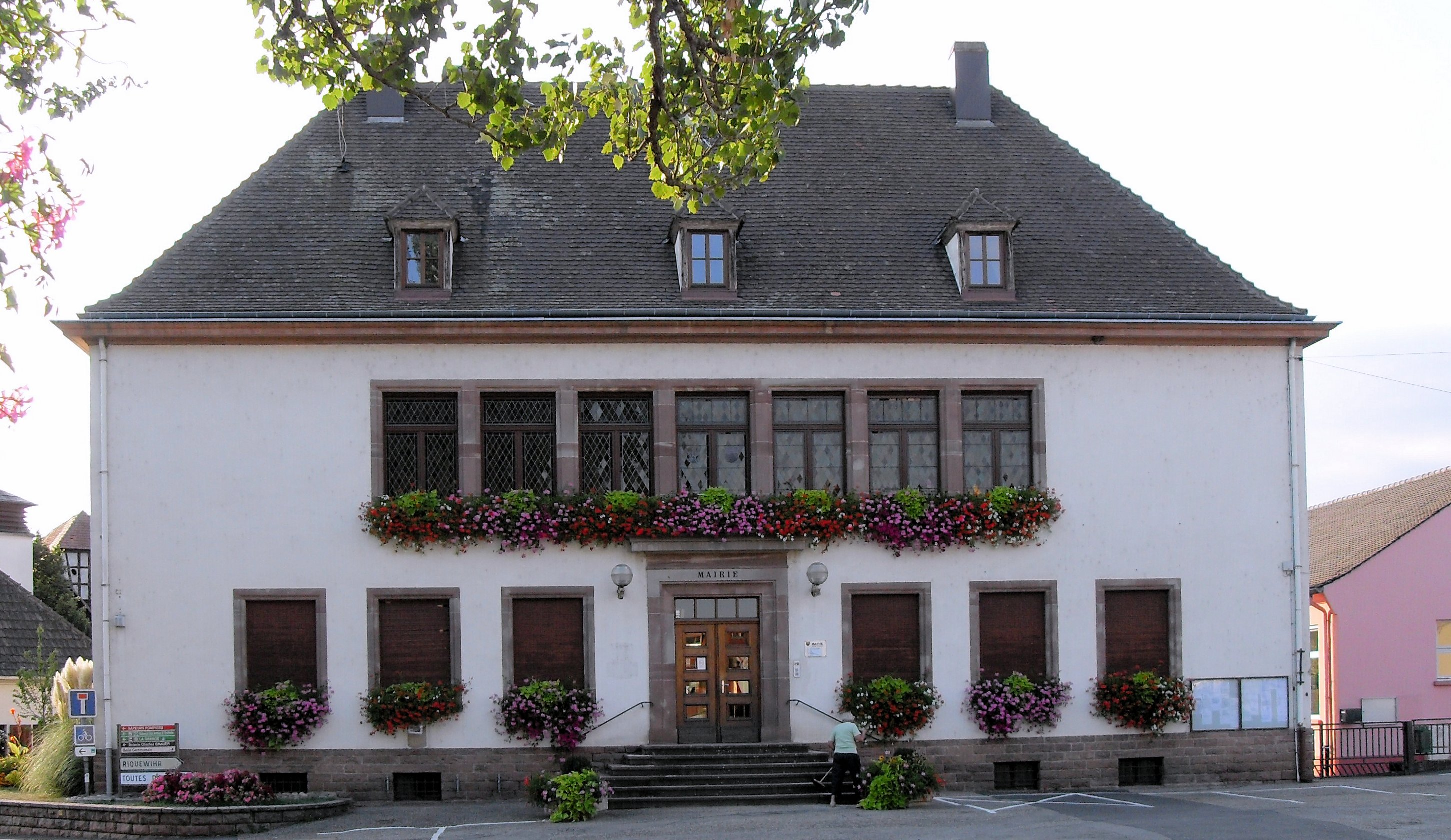 La mairie d'Ostheim